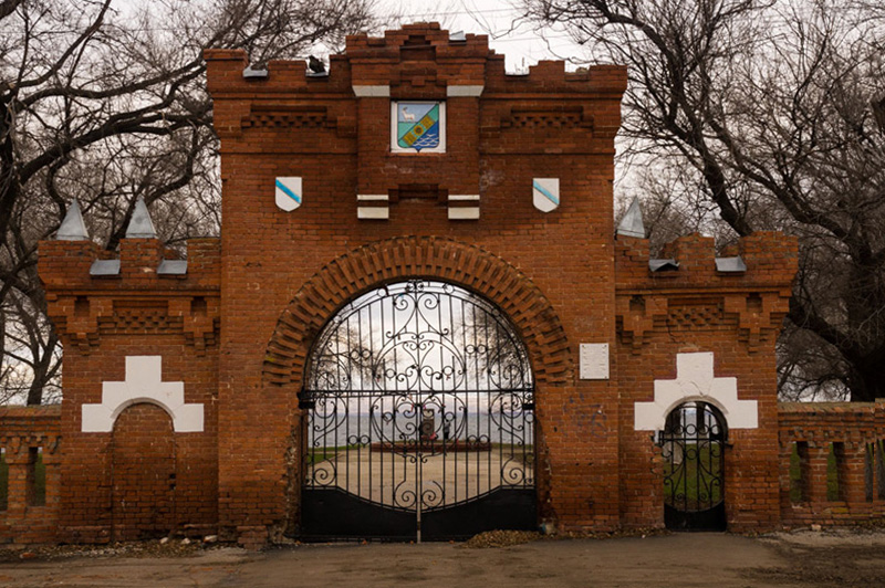 Ворота и ограда: улица Советская, 19, Приволжье, Приволжский район, Самарская область